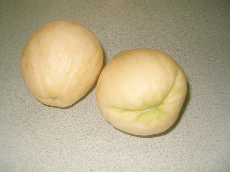 Perulero blanco (white chayote, Sechium edule) cultivado en Guatemala.